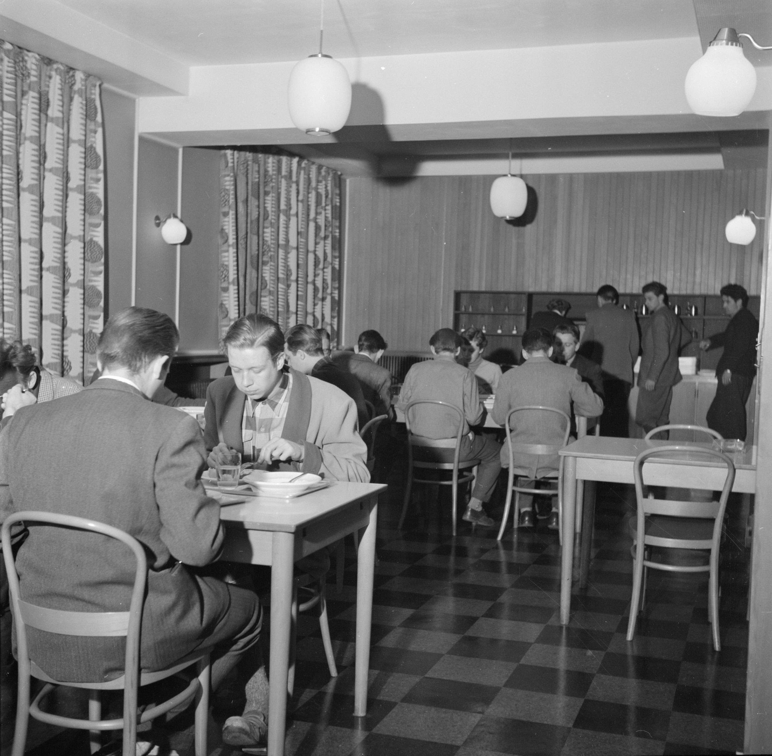 Collectie / Archief : Fotocollectie Van de Poll Reportage / Serie : Het 4 mei studentenhuis Beschrijving : Studenten in de eetzaal van het studentenhuis Annotatie : Het studentenhuis is gebouwd met steun uit het Fonds van de Vrijheid en alleen toegankelijk voor (klein)kinderen van vrijheidsstrijders uit de tweede wereldoorlog Datum : maart 1954 Locatie : Denemarken, Frederiksberg Trefwoorden : dagelijks leven, eters, huisraad, interieurs, kamerverhuur, keukens, maaltijden, meubilair, serviesgoed, studenten, studentenhuisvesting Fotograaf : Poll, Willem van de, [onbekend] Auteursrechthebbende : Nationaal Archief Materiaalsoort : Negatief (zwart/wit) Nummer archiefinventaris : bekijk toegang 2.24.14.02 Bestanddeelnummer : 252-8952